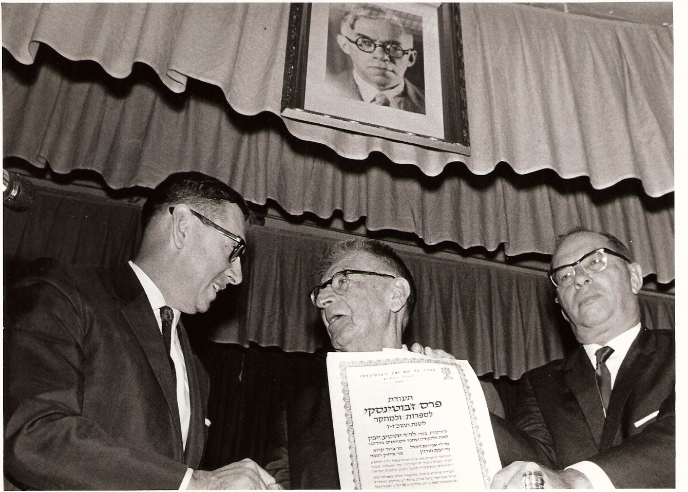 Yeivin J. getting "Zabotinski Prize"